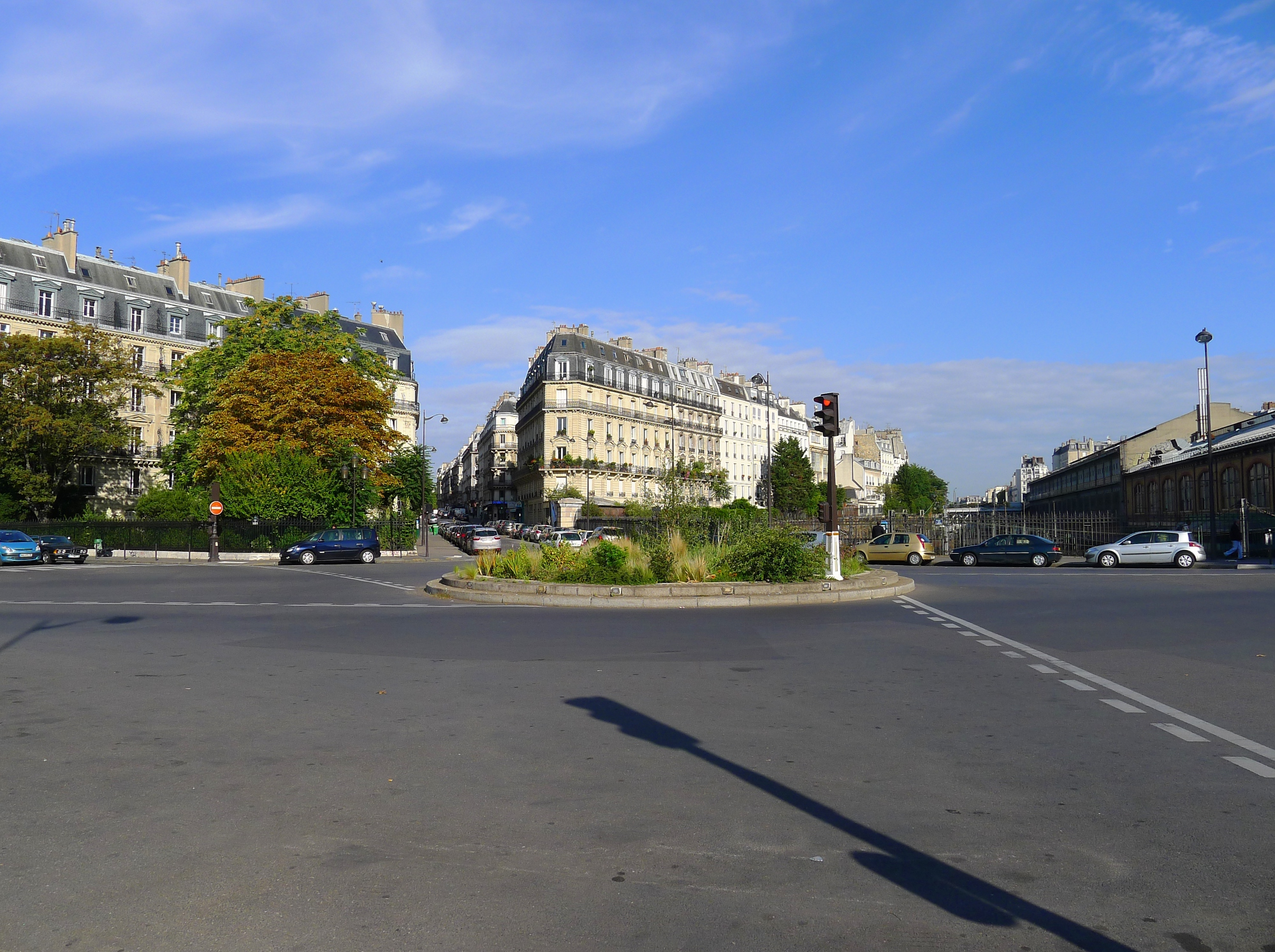 Place de l'Europe - Paris VIII